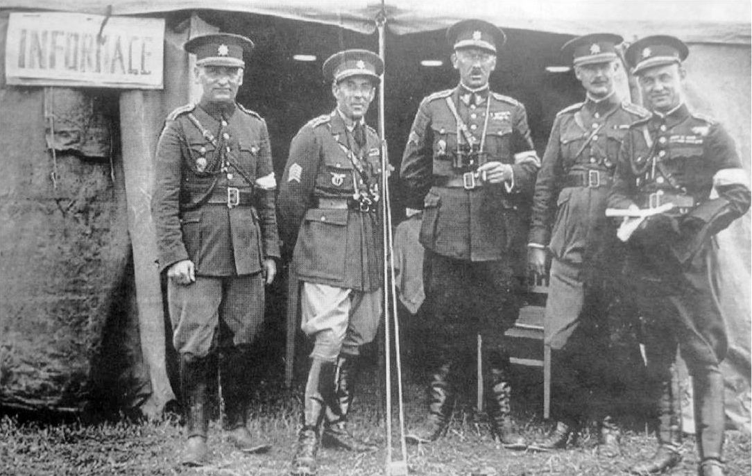 Plukovník generálního štábu Tomáš Plch (* 1890 - 1942) stojící uprostřed skupinky. Zcela vpravo je brigádní generál František Moravec (* 1895 – 1966), šéf tehdejší vojenské zpravodajské služby. Snímek z 30. let dvacátého stolení pochází z vojenských manévrů československé armády. Autor fotografie není znám. (Vojenský historický ústav Praha.) Tomáš Plch (* 13. prosince 1890, Majdalena, Okres Jindřichův Hradec - 6. listopadu 1942, Berlín, Věznice Plötzensee) byl za první světové války příslušníkem československých legií v Rusku. Po návratu z Vladivostoku do Československa se stal vojákem z povolání. Ve vyšších důstojnických hodnostech prošel mnoha různými funkcemi v prvorepublikové československé armádě. Po vypuknutí druhé světové války se zapojil (jako bývalý plukovník generálního štábu) do práce v domácím odboji - v ilegální vojenské organizaci Obrana národa (ON). Byl spoluorganizátorem Oblastního velitelství ON Velká Praha a předurčený velitel Vinohradské brigády ON. Po zatčení gestapem (4. června 1941) byl vězněn, krutě vyslýchán a nakonec berlínským lidovým soudem odsouzen (za velezradu a napomáhání nepříteli) k trestu smrti gilotinou. Byl popraven 6. listopadu 1942 v Berlíně, ve věznici Plötzensee. Po skončení druhé světové války byl posmrtně povýšen do hodnosti brigádního generála a vyznamenán (in memoriam) Československým válečným křížem 1939.